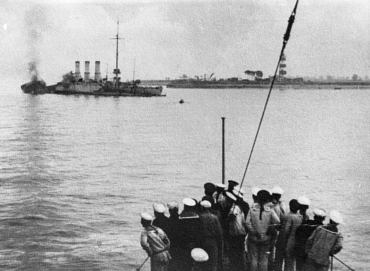 Kleiner Kreuzer Magdeburg Magdeburg, Kleiner Kreuzer; Stapell: 13.5.1911; 26. Aug. 1914: Nach Strandung im Finnischen Meerbusen gesprengt [Kleiner Kreuzer SMS Magdeburg]